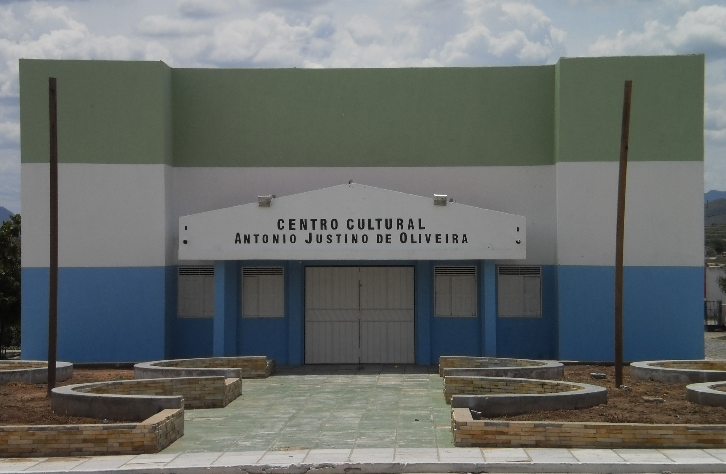 Centro Cultural Antonio Justino de Oliveira - Rafael Fernandes, Rio Grande do Norte, Brasil.